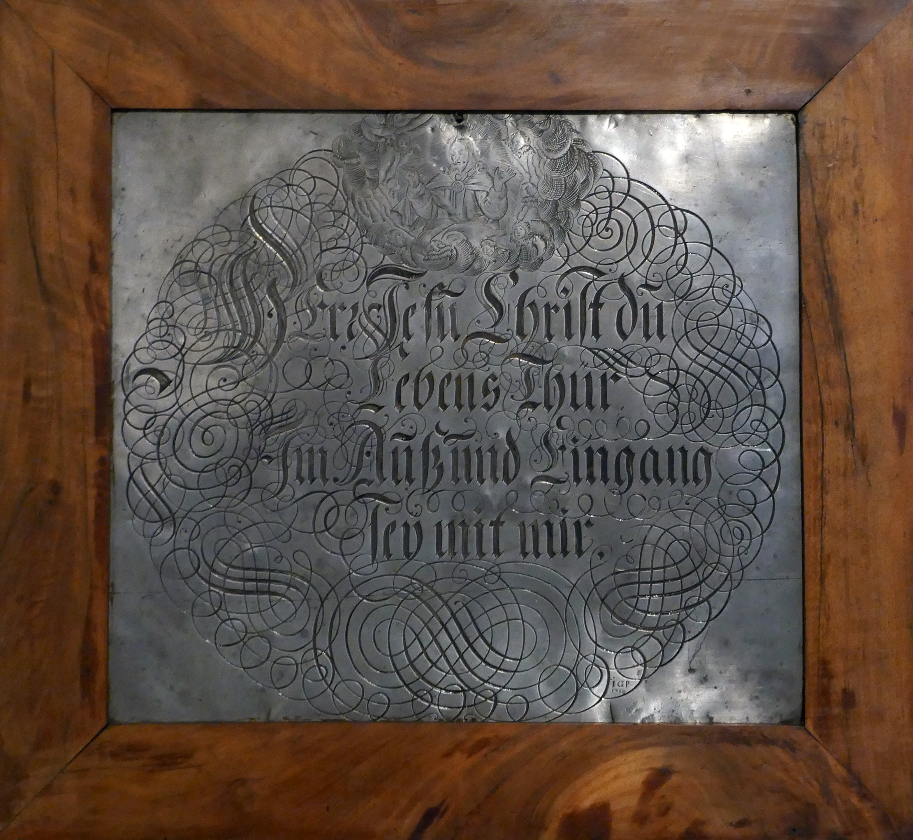 Bénédiction du seuil. Etain gravé de J. G. Praunsmentel à Strasbourg, 1708. Herr Jesu Christ, du Lebens Thür, im Auß- und Eingang Sey mit mir. ("Que j'entre ou que je sorte, Seigneur Jésus-Christ, porte de la vie, reste avec moi". Exposition Vies protestantes : le mot et l'image au Musée alsacien de Strasbourg (2017)